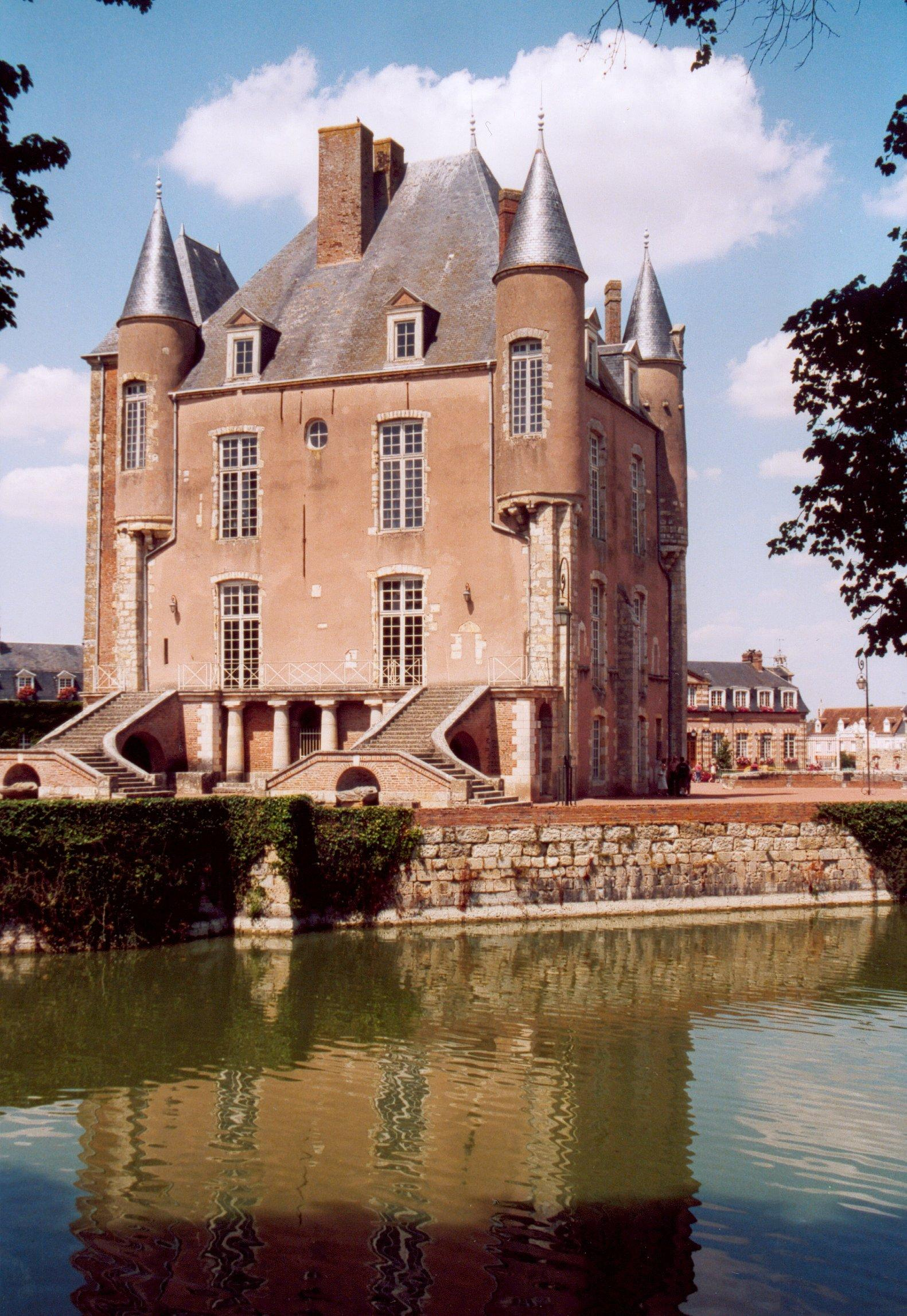 France Loiret Bellegarde Château Photographie prise par GIRAUD Patrick